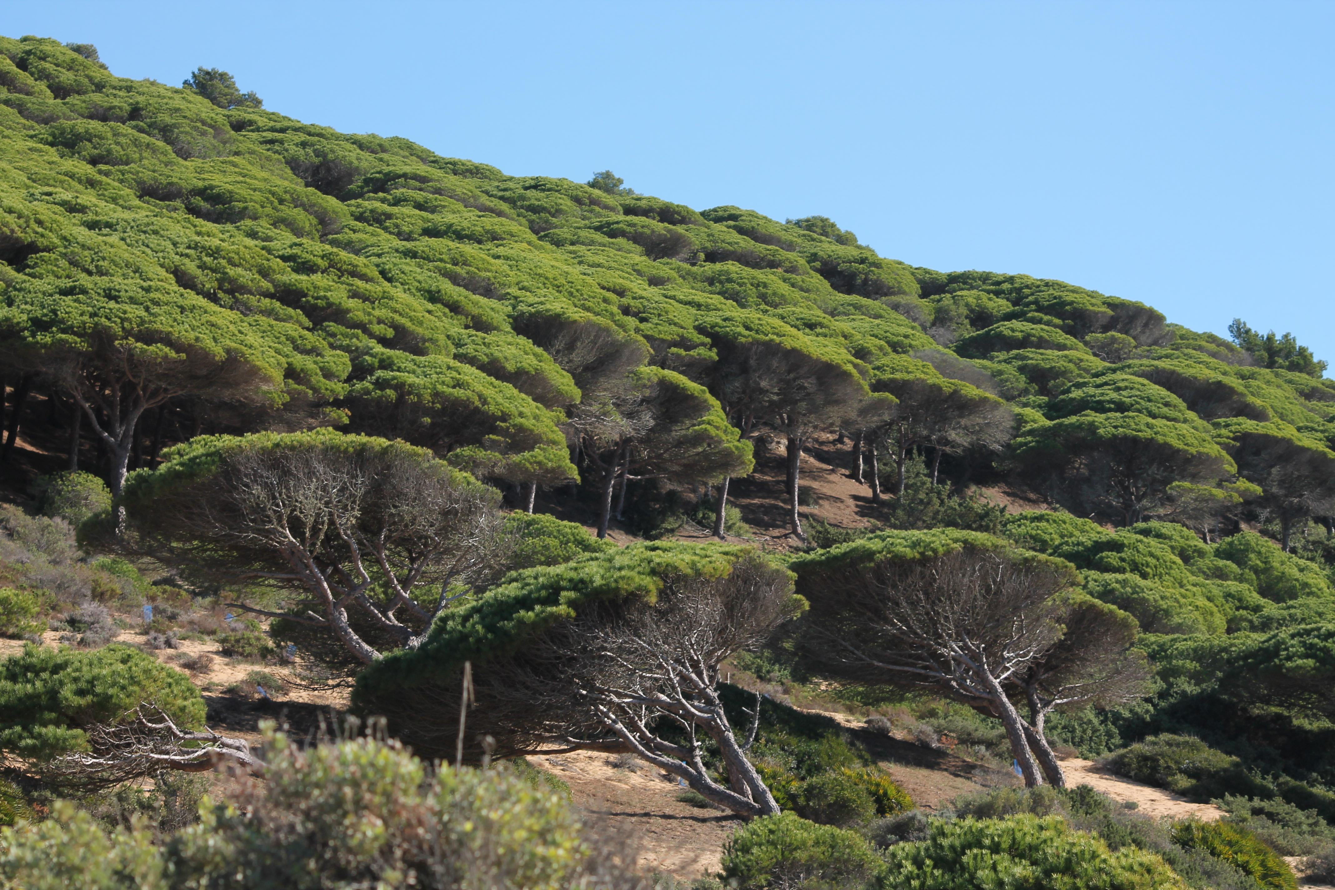 Parque natural de La Breña y Marismas del Barbate This is a photography of a Site of Community Importance in Spain with the ID: ES6120008. Natura2000 entry, EEA entry